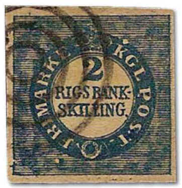 Вторая почтовая марка Дании, 1851 год.